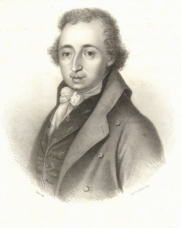 Bernhard Vinzenz Adler (1753 - 1810), Lékař a průkopník lázeňství v západních Čechách.